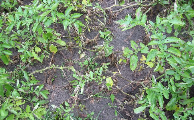 zelfgemaakte foto; aardappelziekte op 'Doré'